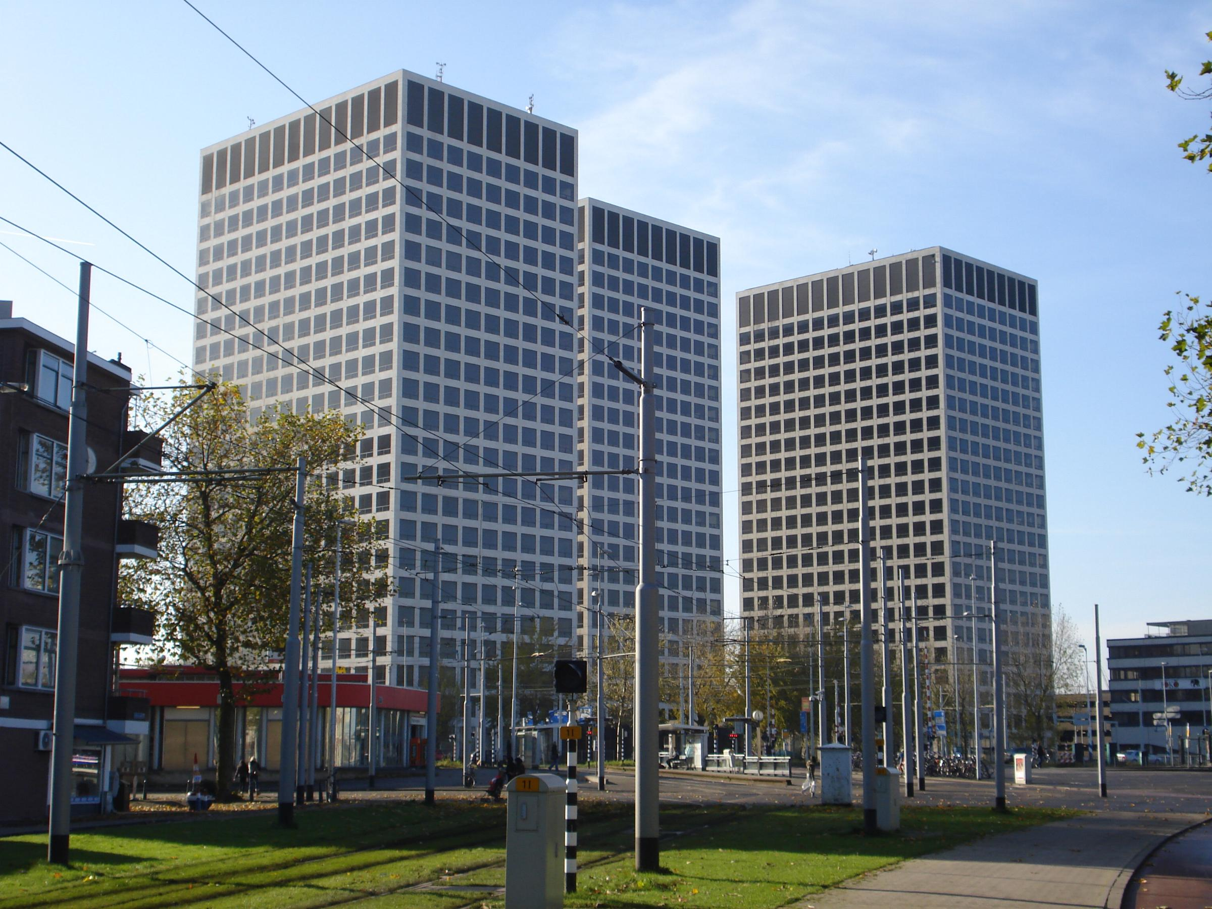 Rotterdam, Marconiplein. Europoint gebouw.